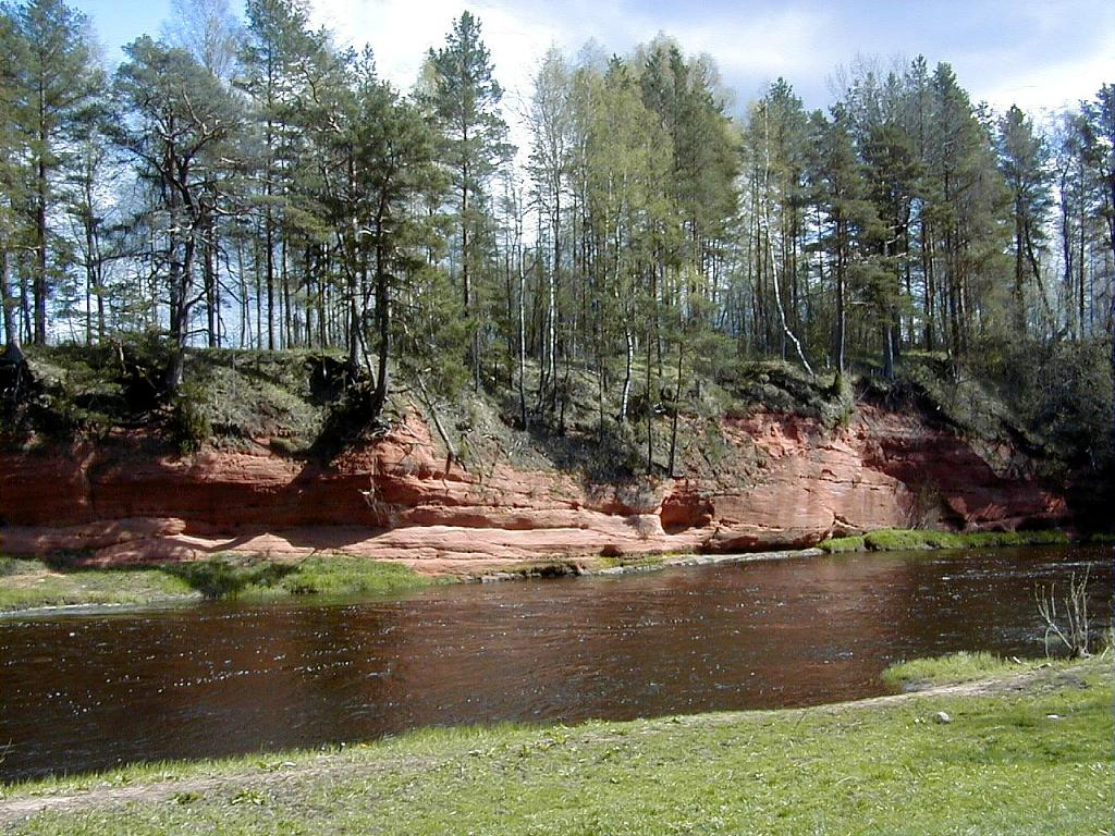 Sarkanās klintis pie Salacas 2002-05-01